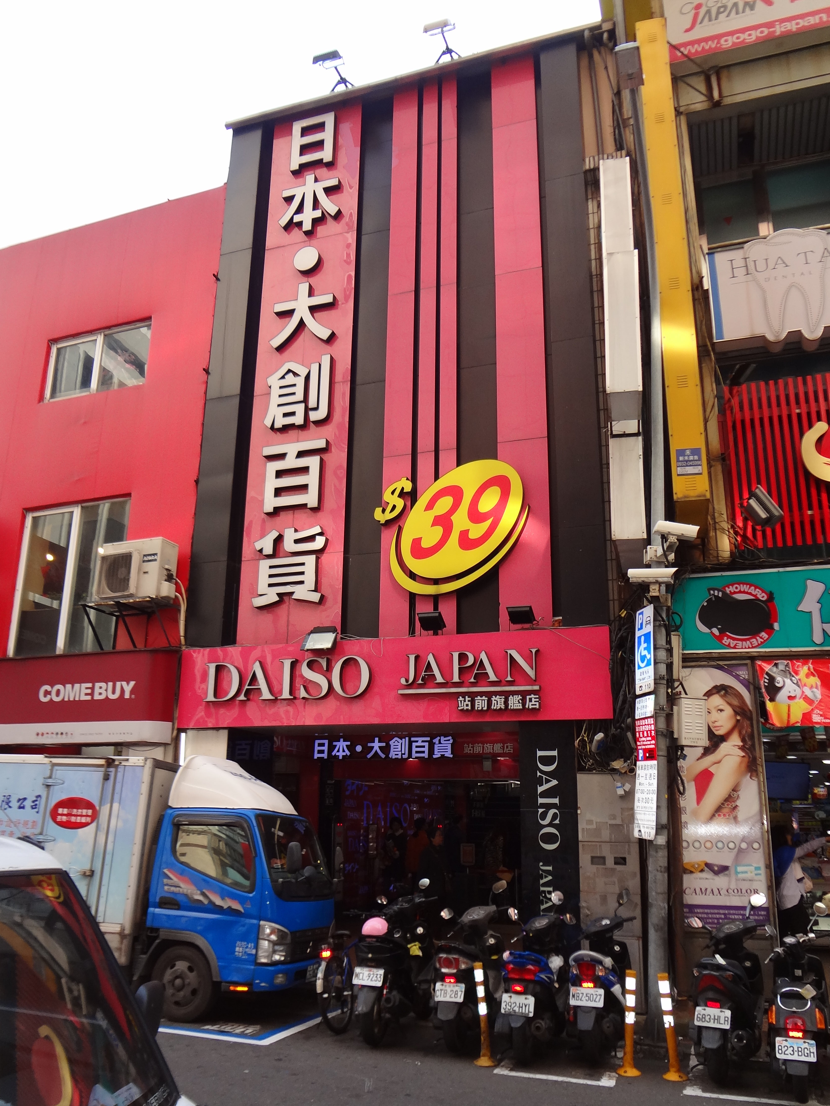 台灣大創百貨台北站前店，地址：臺北市中正區許昌街28號。